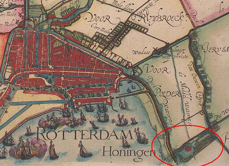 Hoflaan in Kralingen, detail uit de kaart van Schieland van 1611